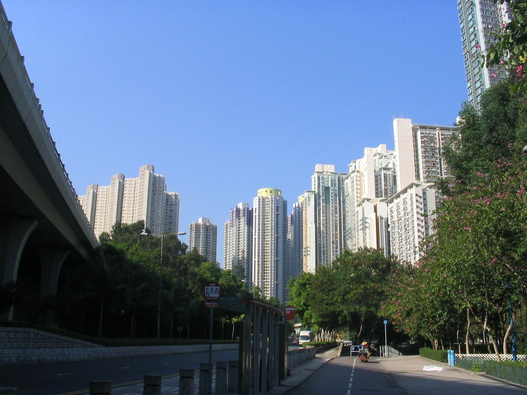 寶琳 Po Lam